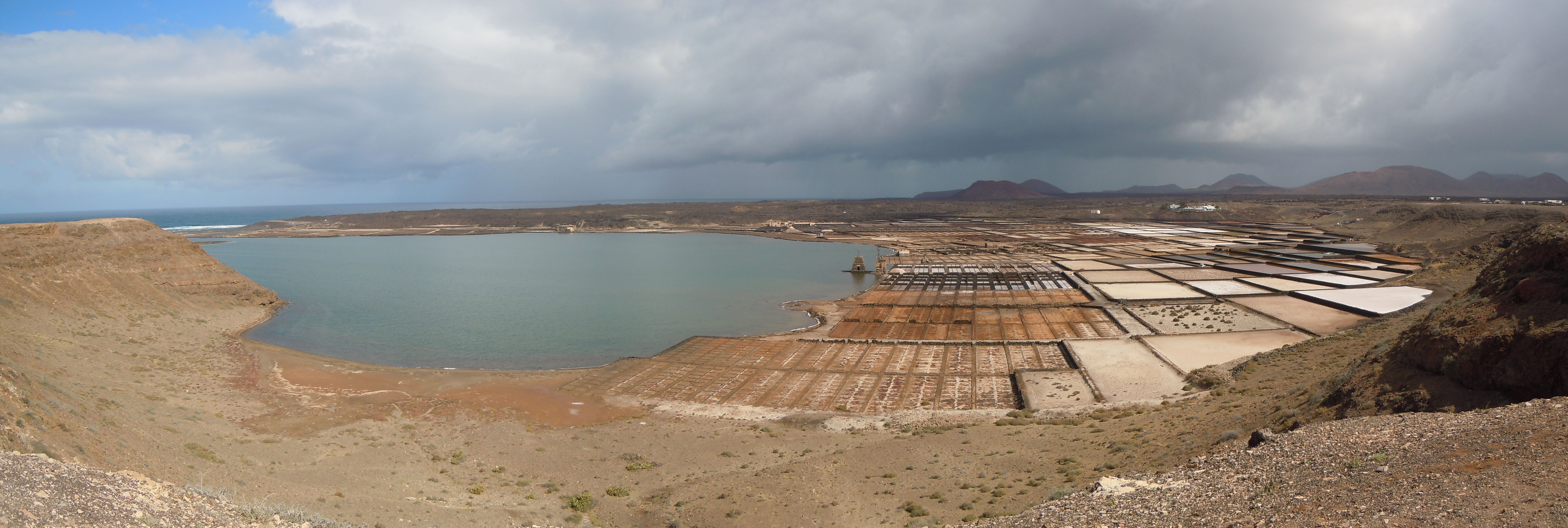 Salinas de Janubio, Lanzarote